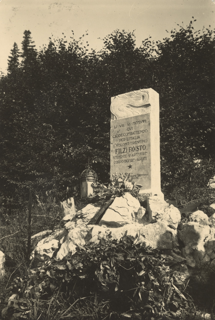 Altipiano di Asiago, Croce S.Antonio Cippo Fausto Filzi (corpo bombardieri - arditi)